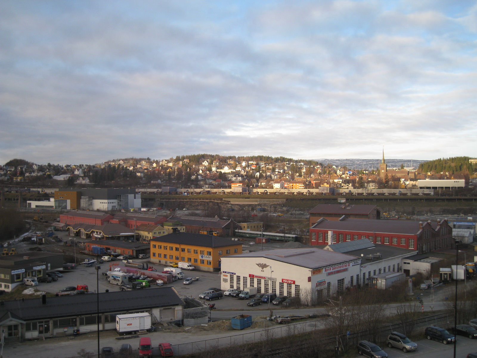 Bildet er tatt fra Postbygget og viser sentrale deler aav det tidligere NES-område "Tomta"